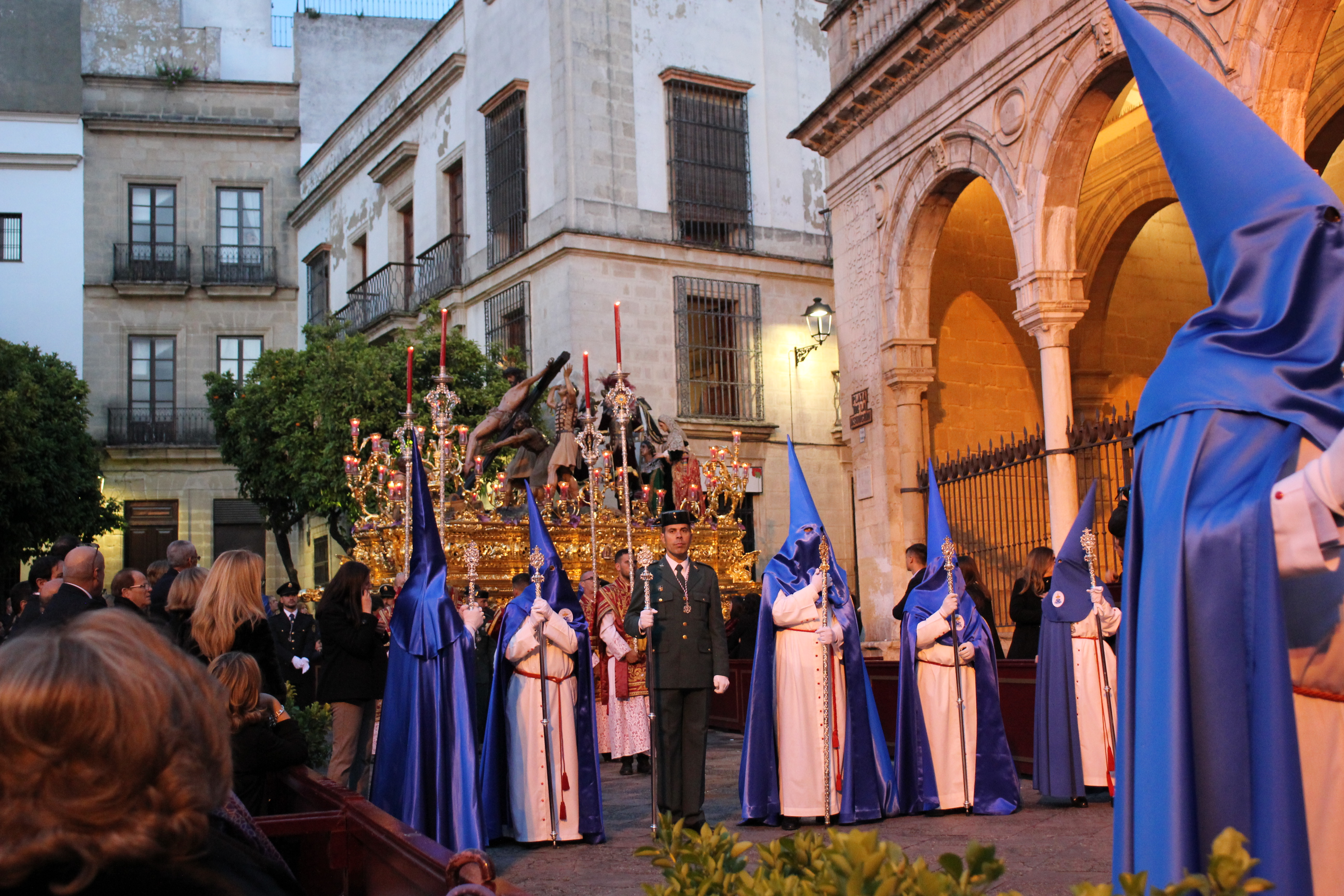 Hermandad de Las Viñas (Jerez)